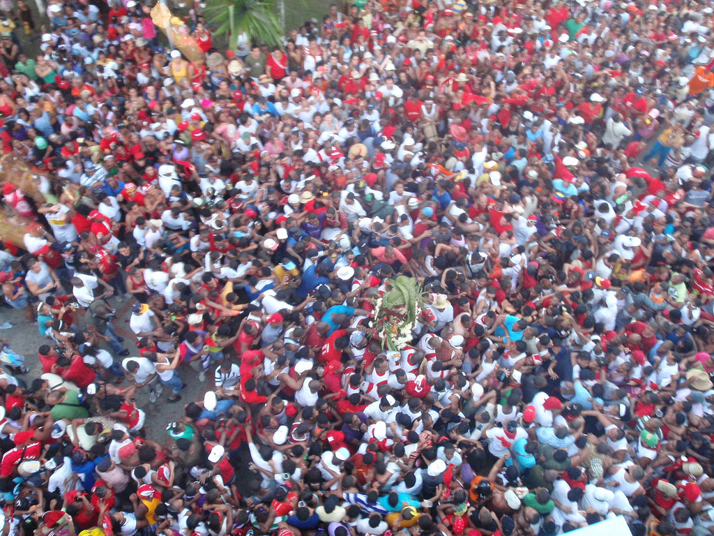 Fiesta San Juan de Curiepe, 25 de Junio, previo al encierro.